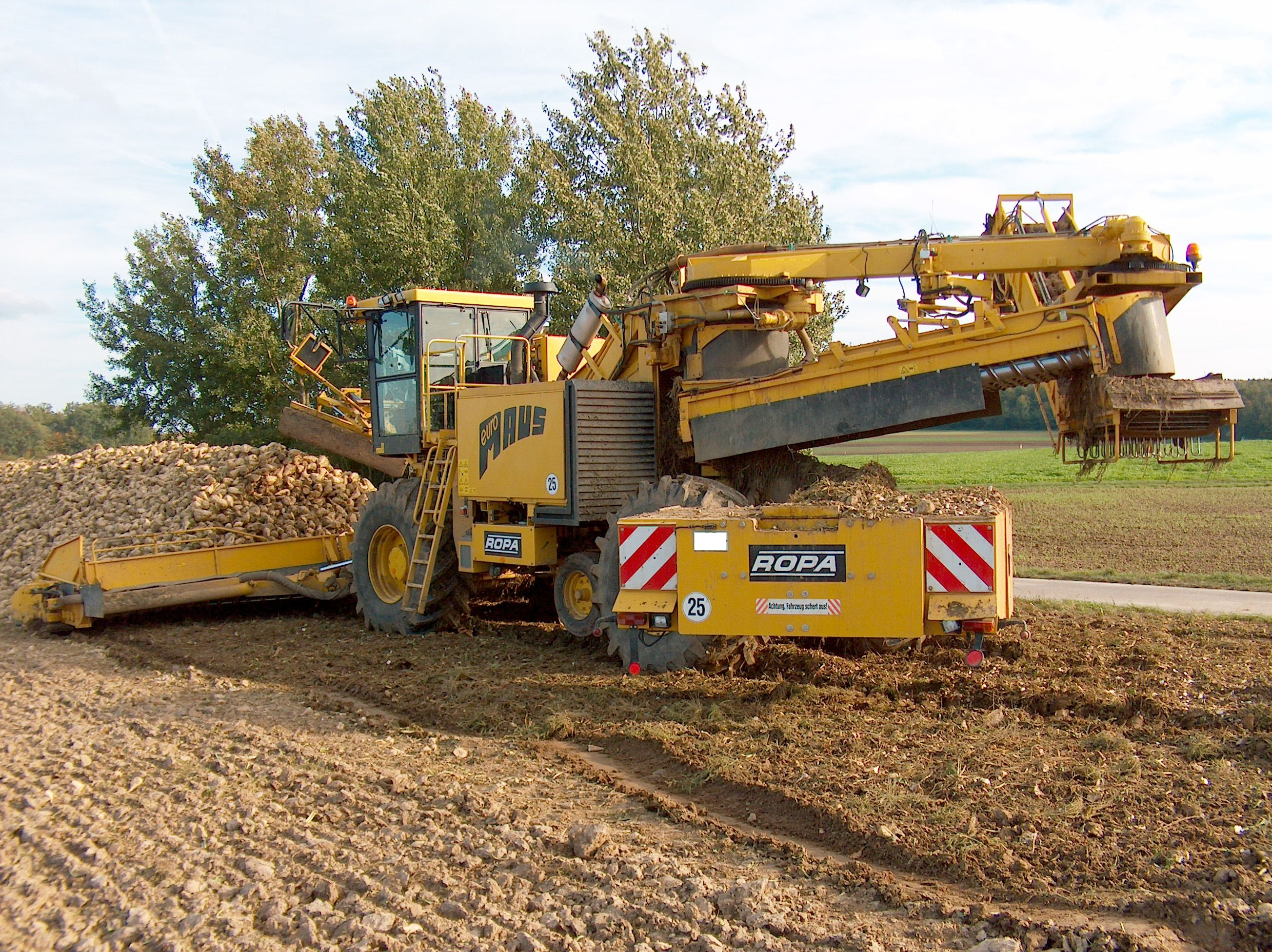 Rübenreinigungslader Euro-Maus der Firma ROPA